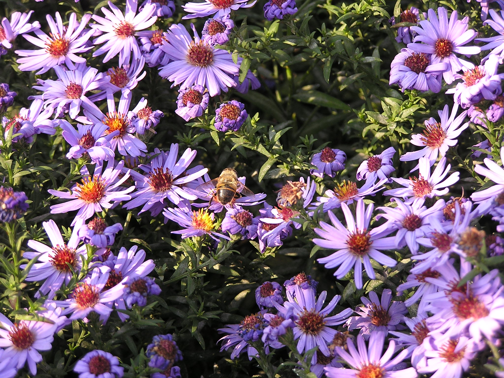 астра, вероятно - Aster alpinus, сфотографировано 8 октября 2005 на клумбе в Донецке